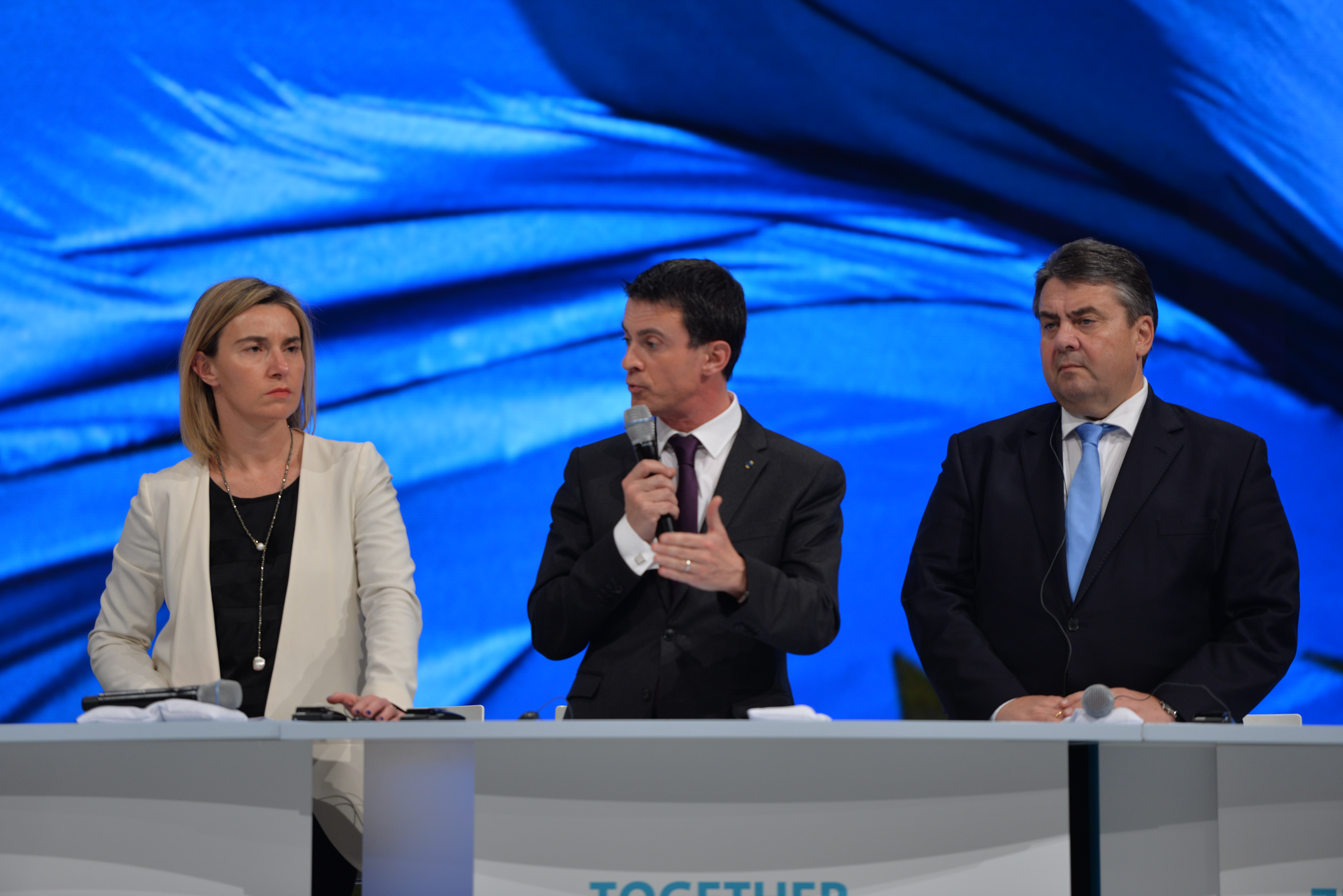 SPD Bundesparteitag 2015 - Gruppenaufnahmen